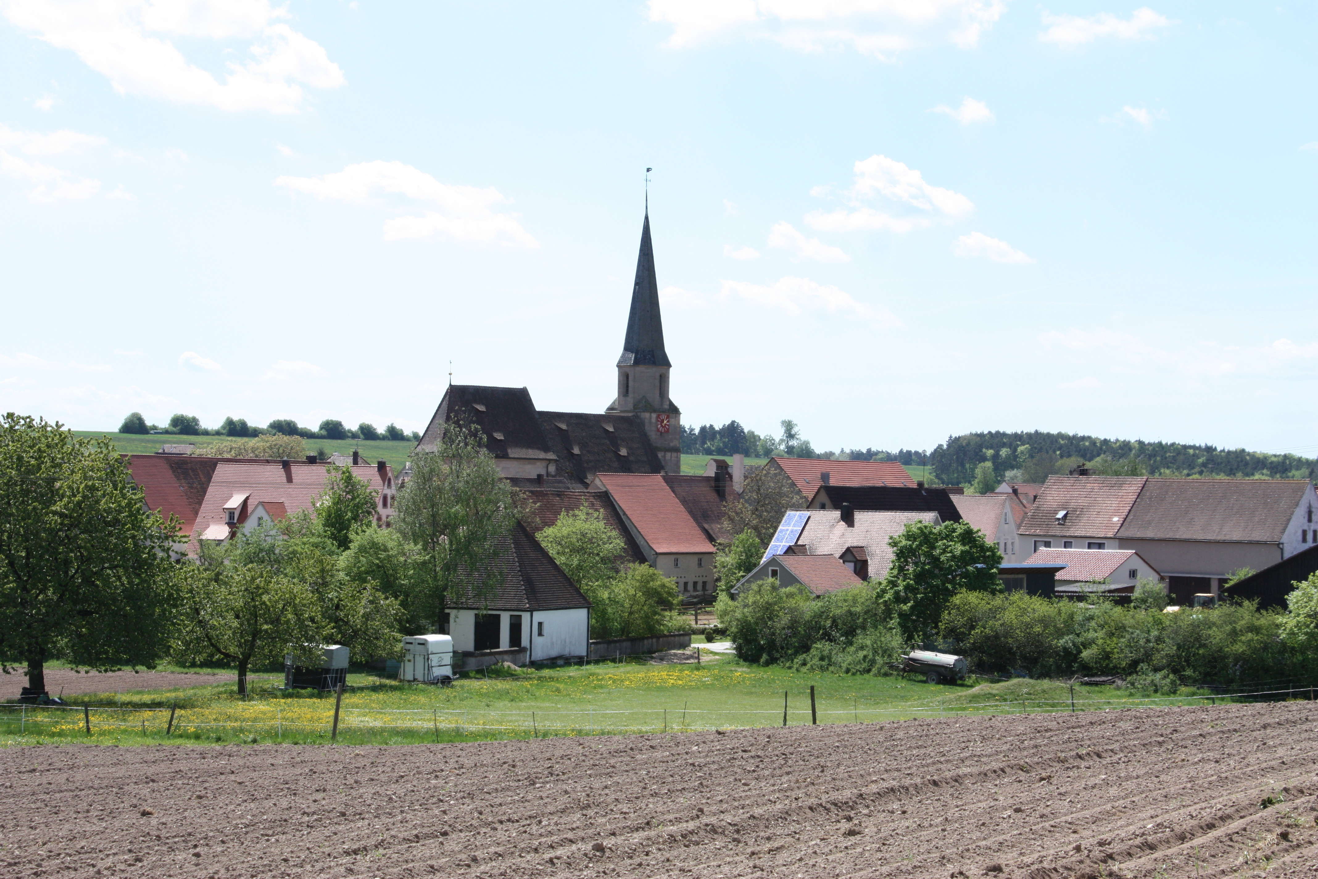 Kalbensteinberg Blick von Nordosten